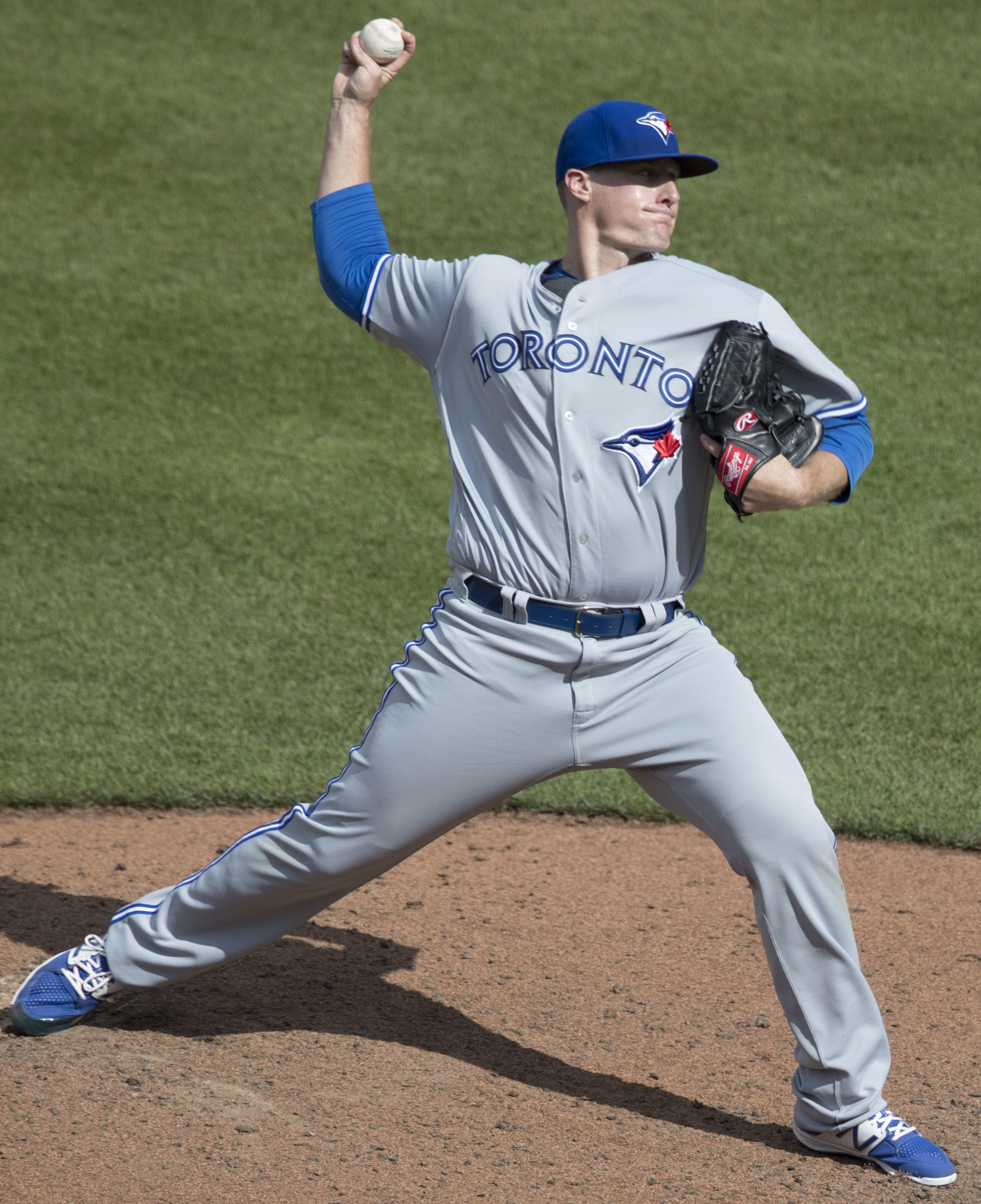 Blue Jays at Orioles 9/3/17